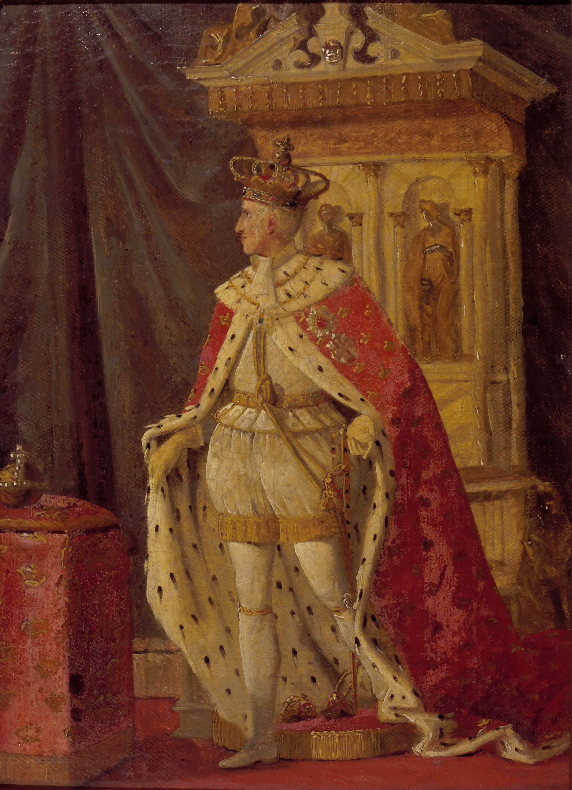 Frederik 6. til danmark i salvingsdragt. Skitse af Vilh. Bendz fra 1830.